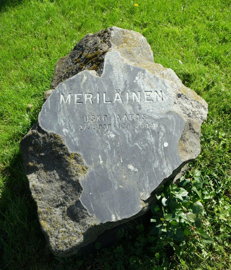 Grab des finnischen Komponisten und Dirigenten Usko Meriläinen (1930-2004) auf dem Friedhof Hietaniemi in Helsinki